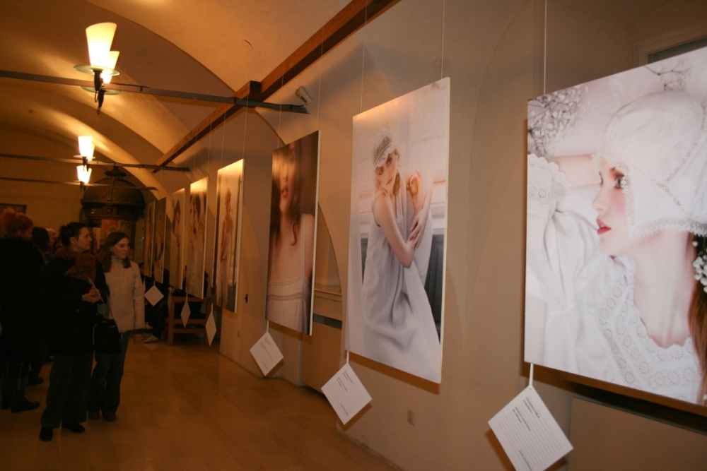 Izložba fotografija povijesnoga donjeg rublja autorice Mare Milin u Muzeju grada Zagreba tijekom Noći muzeja